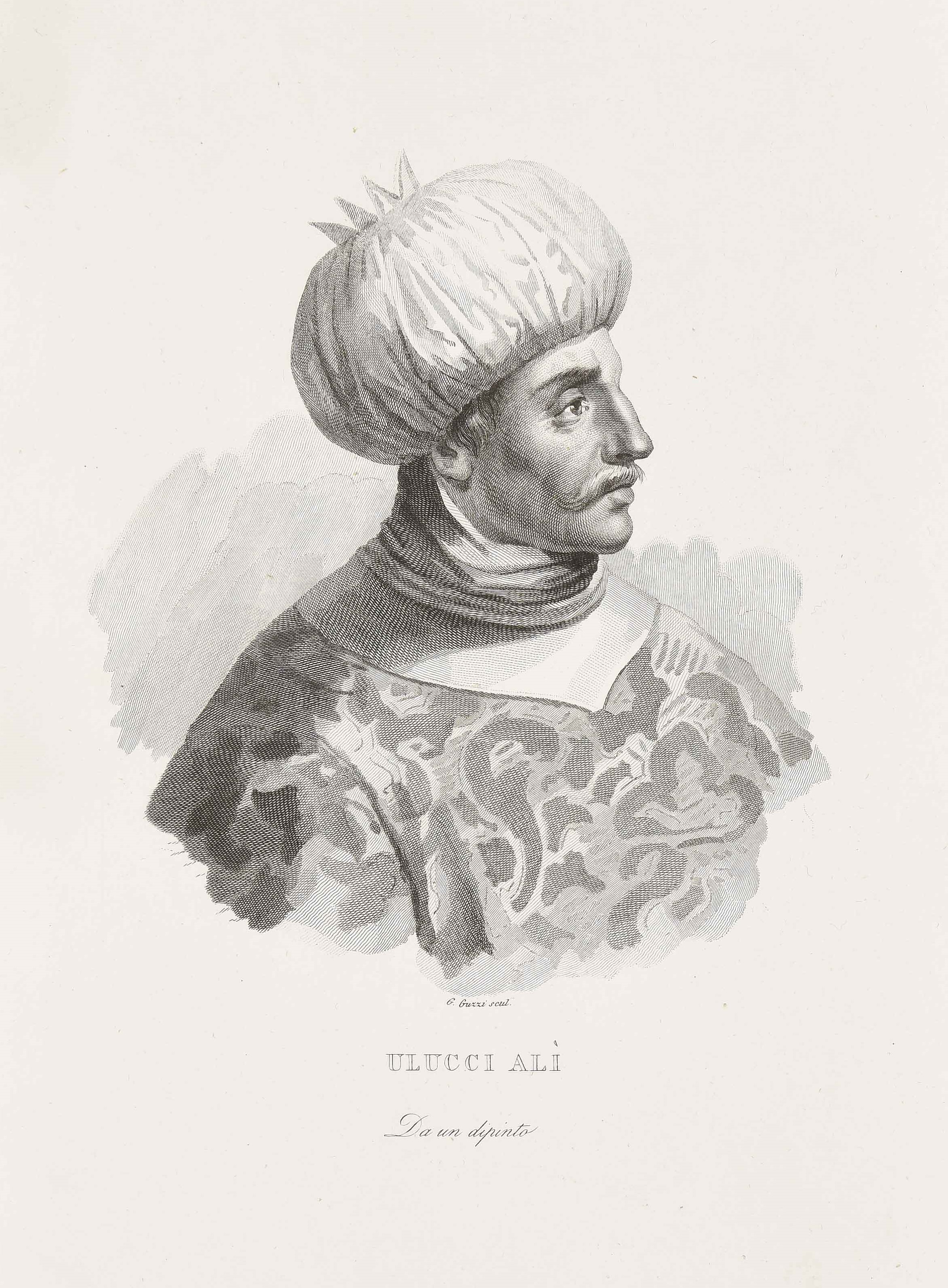 Calcografia in Iconografia italiana degli uomini e delle donne celebri: dall'epoca del risorgimento delle scienze e delle arti fino ai nostri giorni, Milano, Antonio Locatelli, 1837.